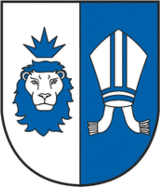 Das Löwenhaupt weist auf die Funde aus der Römerzeit hin, da auf mehreren dieser Skulpturen ein Löwe dargestellt ist. Die Heidenkrone symbolisiert die vorchristliche Antike, während die Bischofsmütze den kirchlichen Stellenwert Bad Waltersdorfs als Urpfarre hervorhebt.